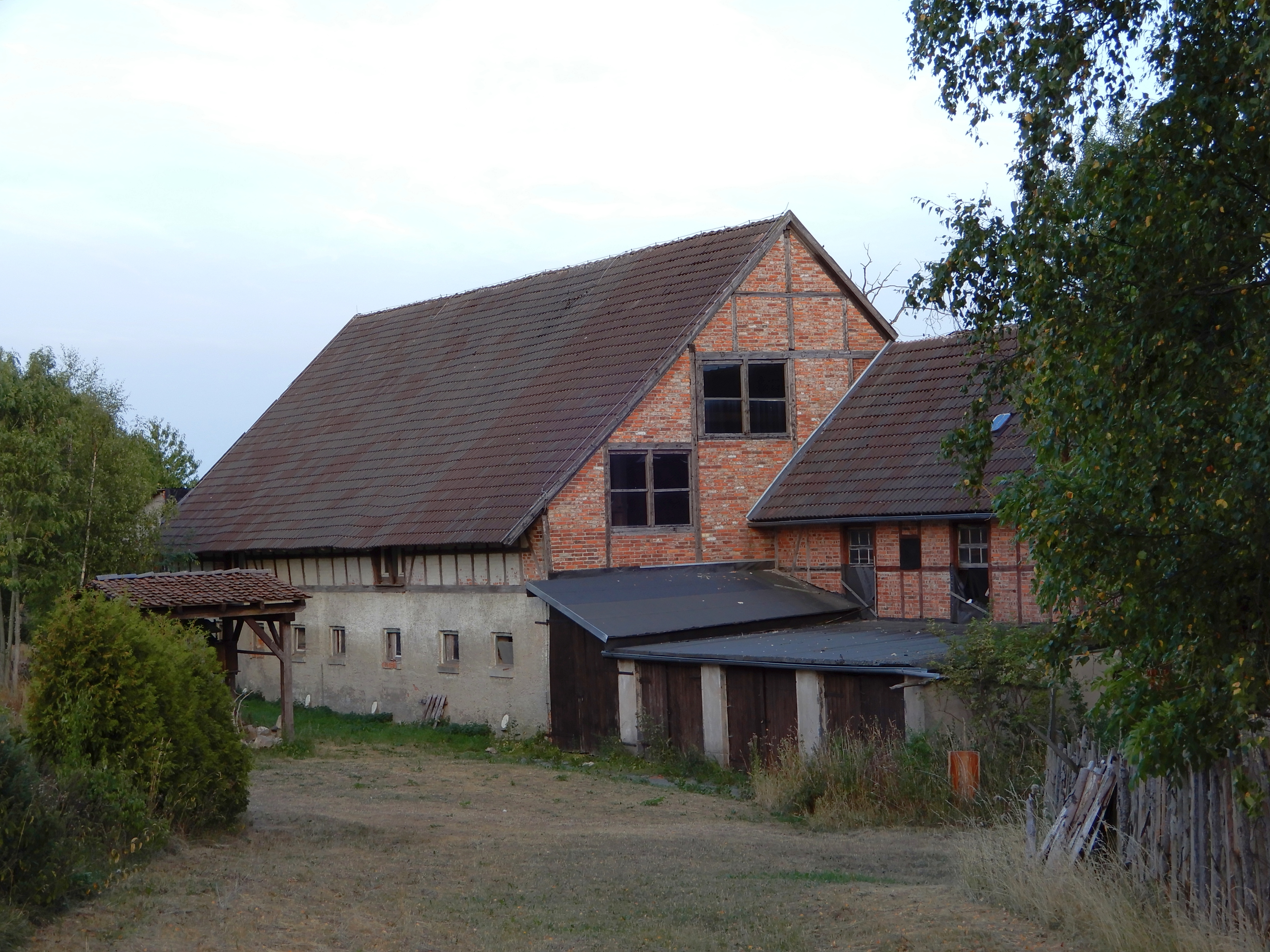 Domäne Bärenrode